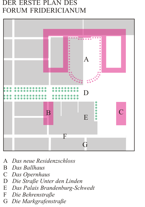 Das Forum Fridericianum in Berlin. Die ursprüngliche Planung.